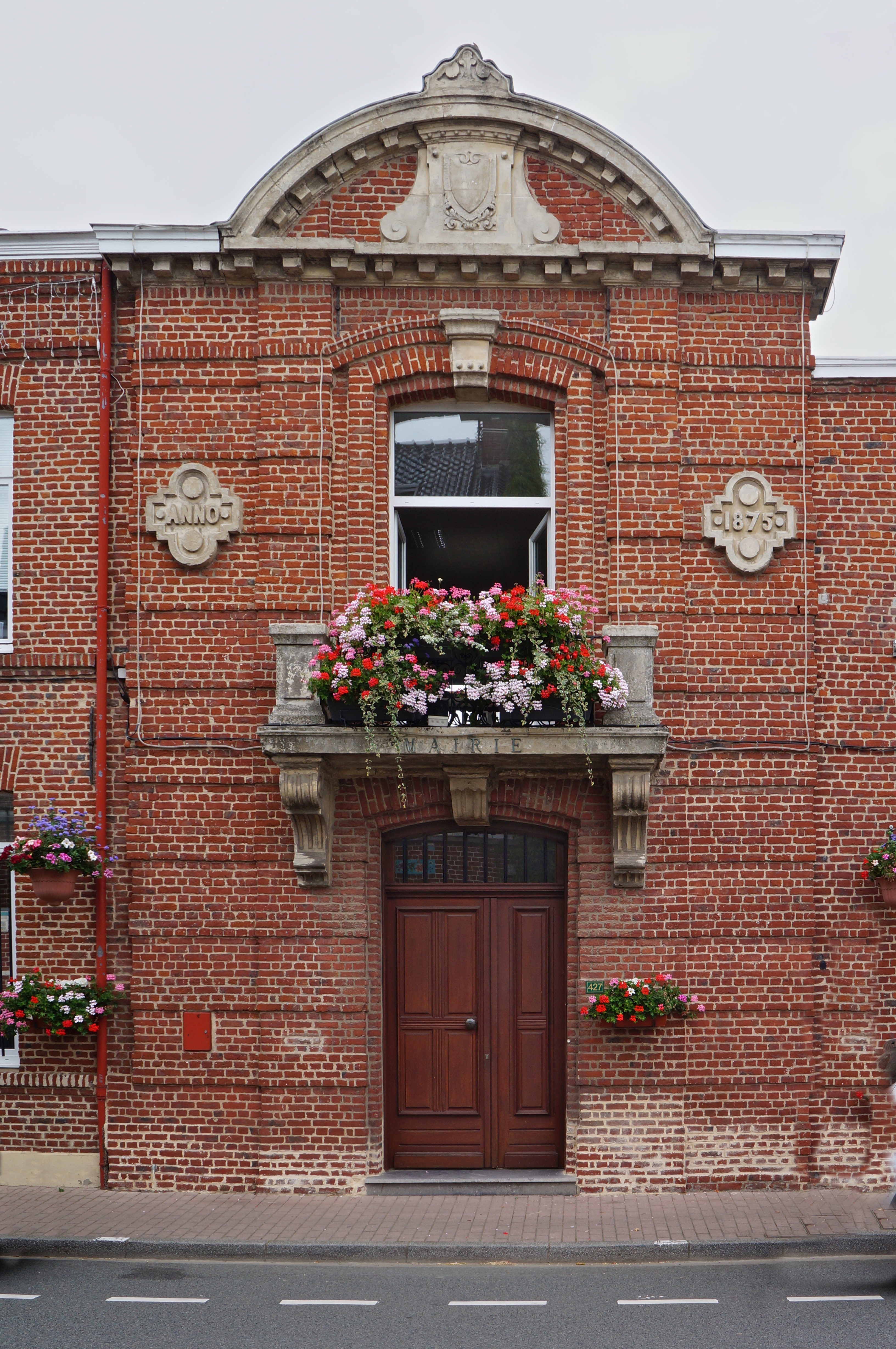 Mairie de Sainghin-en-Mélantois Nord (département français).